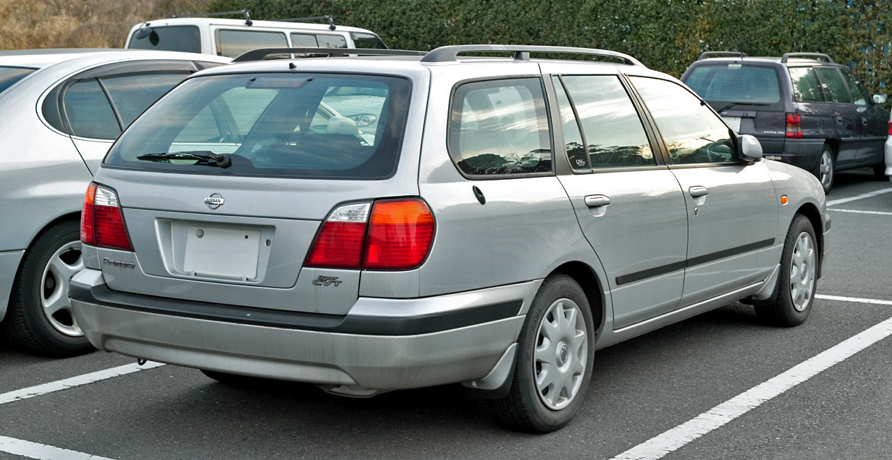 Nissan Primera Wagon ( WP11 )